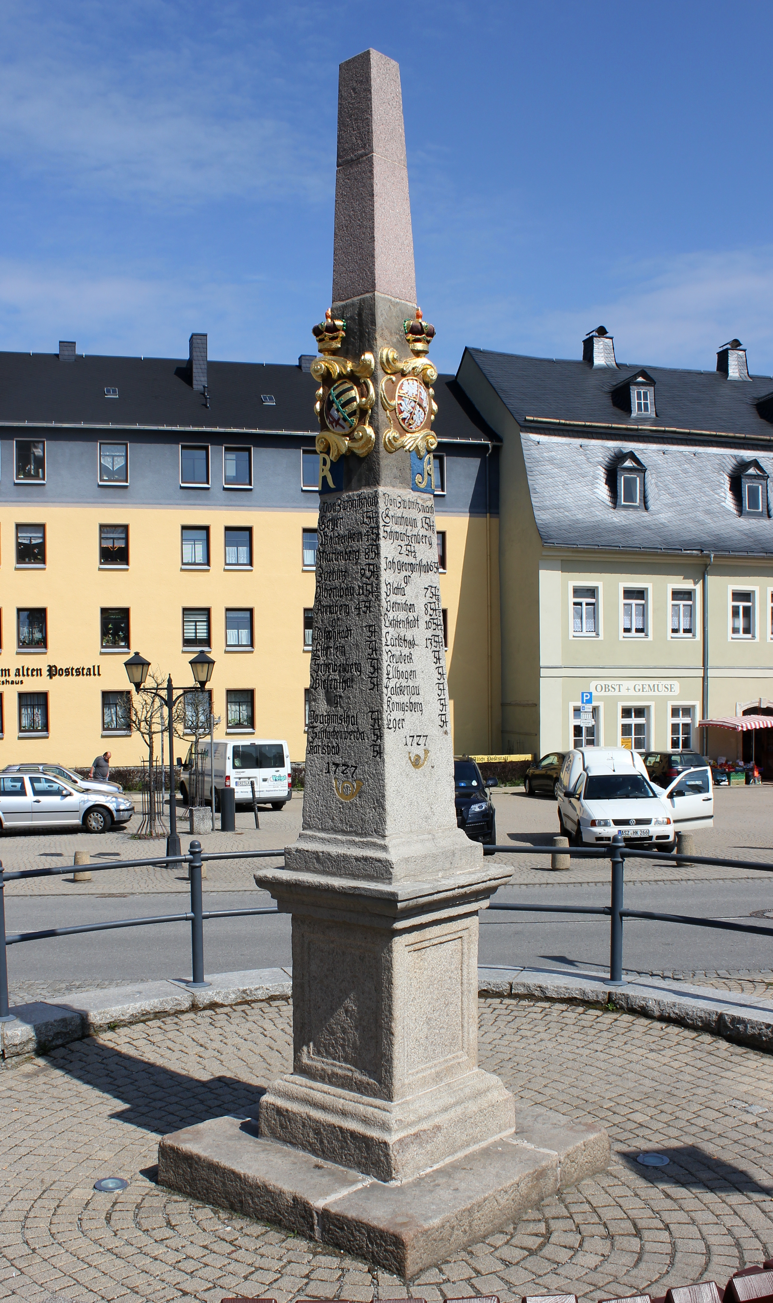 Postmeilenseule. Zwönitz.Erzgebirge. Sachsen.